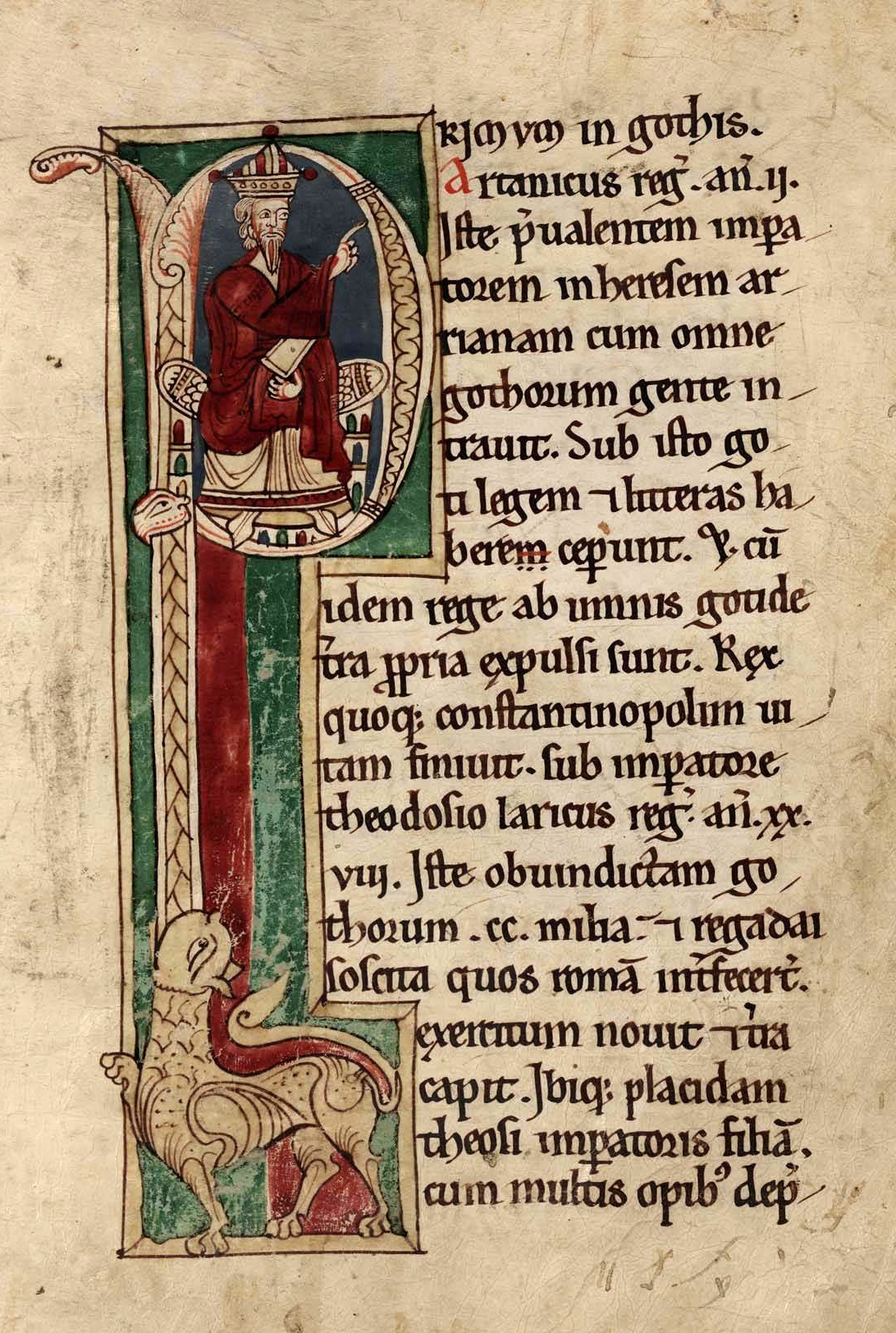 Folio 18 recto del manuscrito 2805 de la Biblioteca Nacional de España (Mss. 2805), titulado en el registro Corpus Pelagianum et alia scripta minora, siglo XII. La miniatura es una Inicial P de personaje, quizá el obispo Dulcidio, sentado en un taburete arquitectónico, vistiendo túnica marfil y manto granate, con mitra triangular y sostieniendo un libro en su mano izquierda y con la derecha extendida, en actitud de bendecir; le acompañan animales monstruosos y grifos.